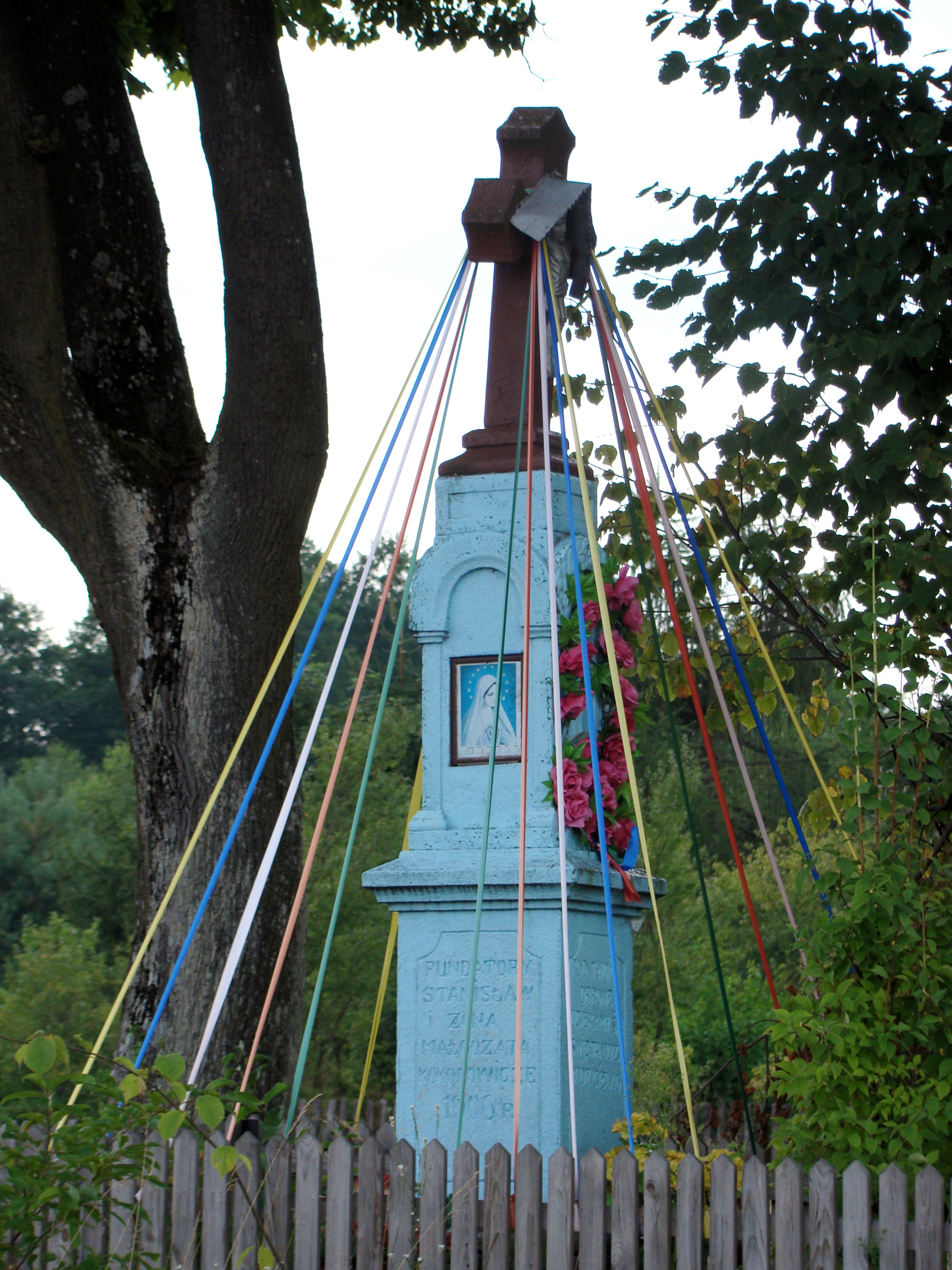 Kříž u silnice ve vesnici Kaczórki, Polsko